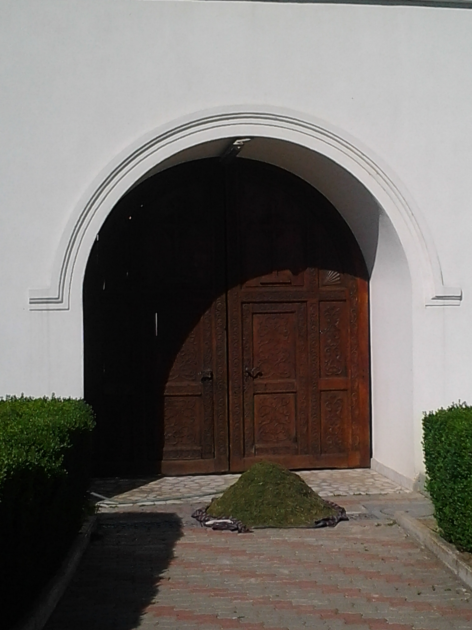 Mănăstirea Clocociov 03